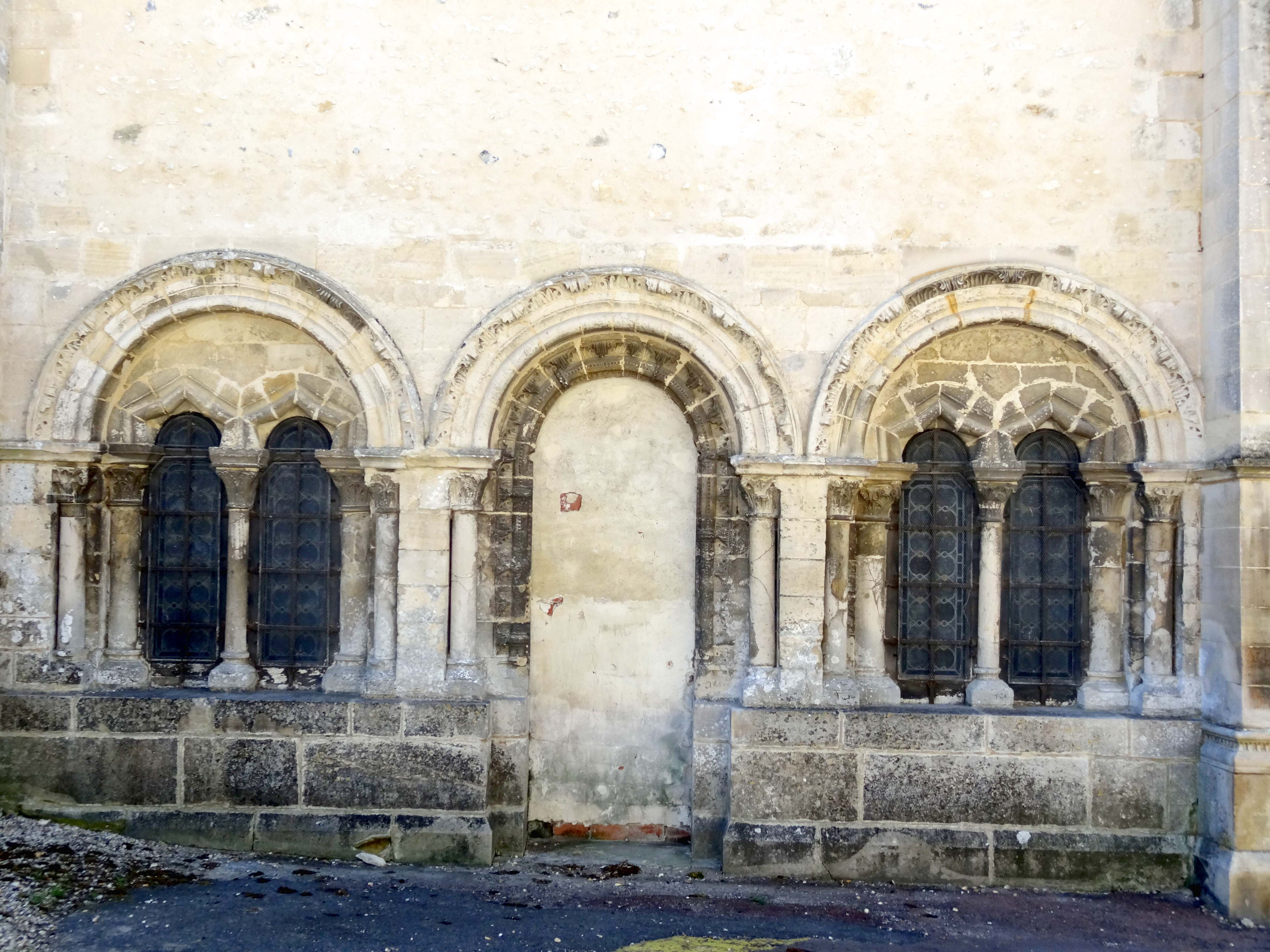 Église Sainte-Madeleine de Trie-Château - voir titre.